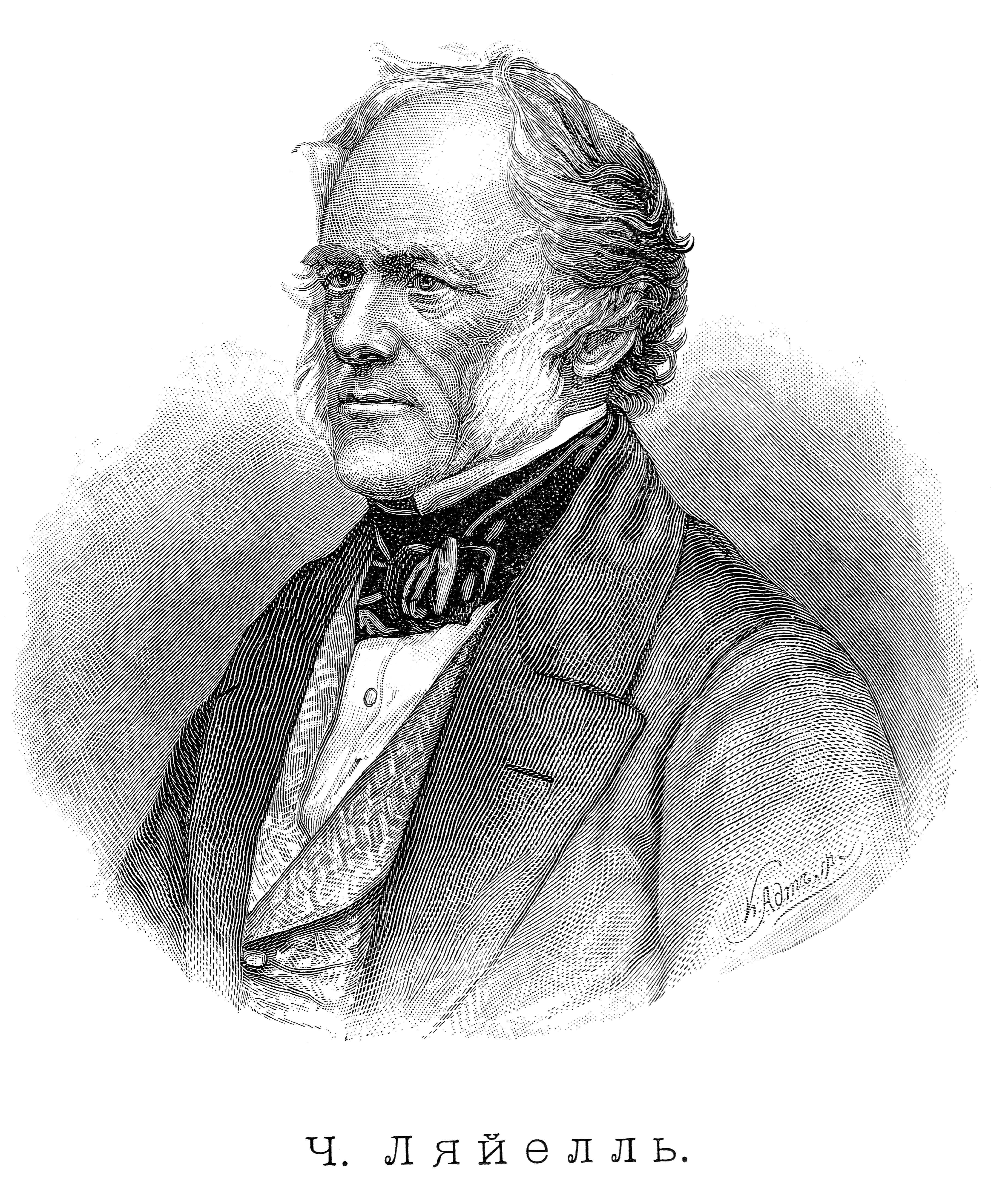 Чарлз Лайель (англ. Sir Charles Lyell, 1797 - 1875) основоположник современной геологии